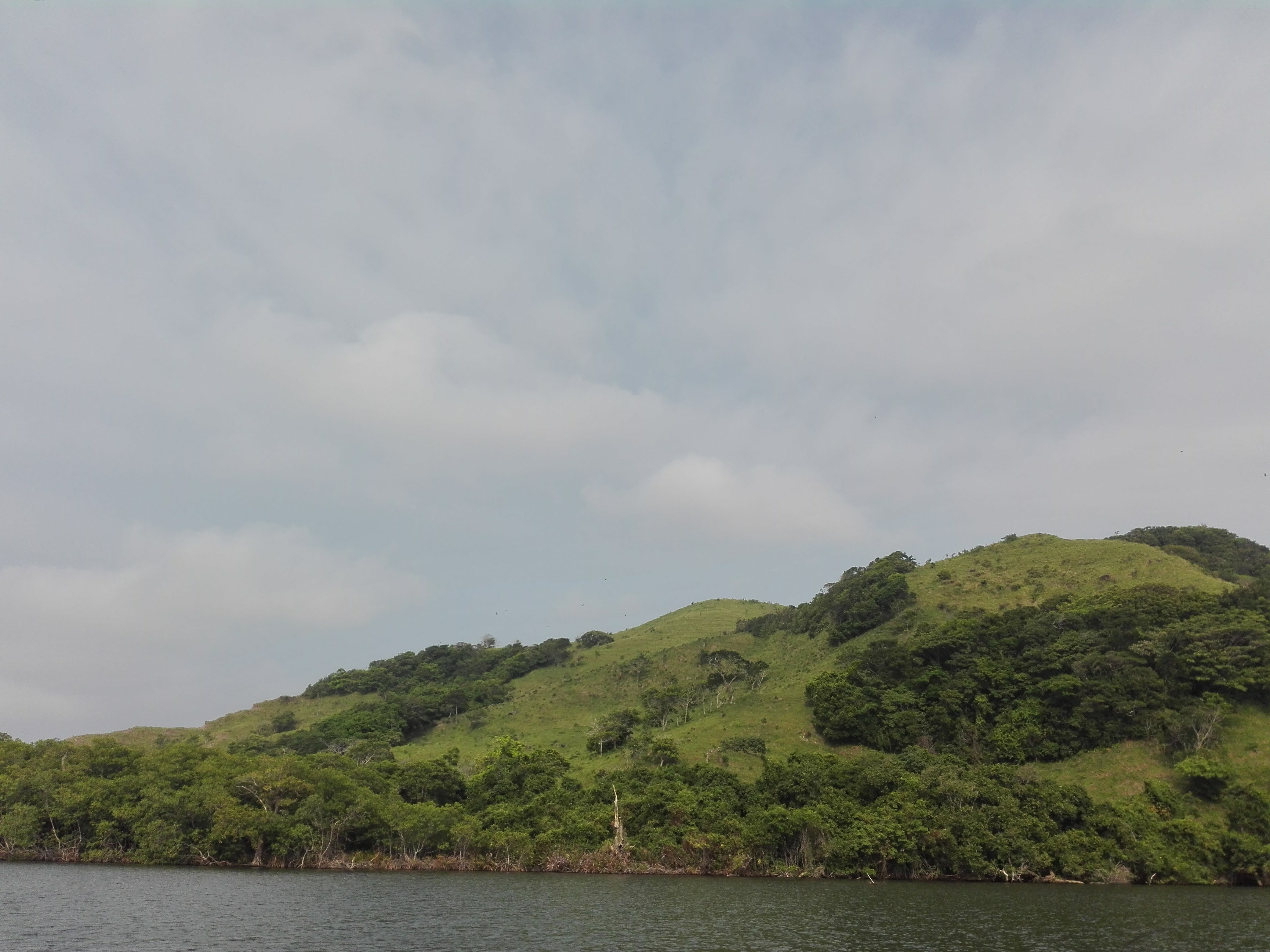 Laguna de Sontecomapan, Catemaco, Veracruz